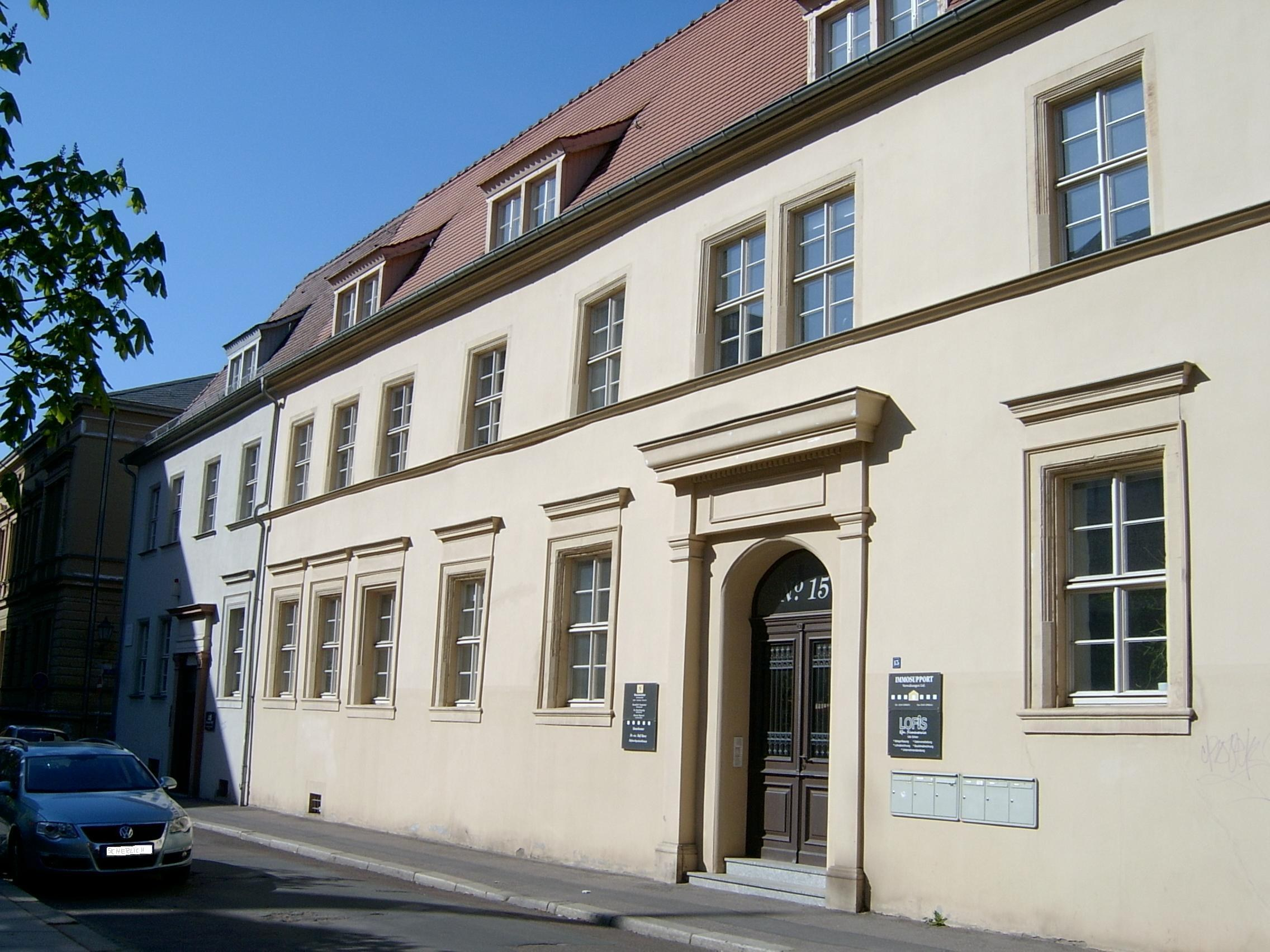 Große Märkerstraße 15 (vorn) und 14 (dahinter) in Halle (Saale)